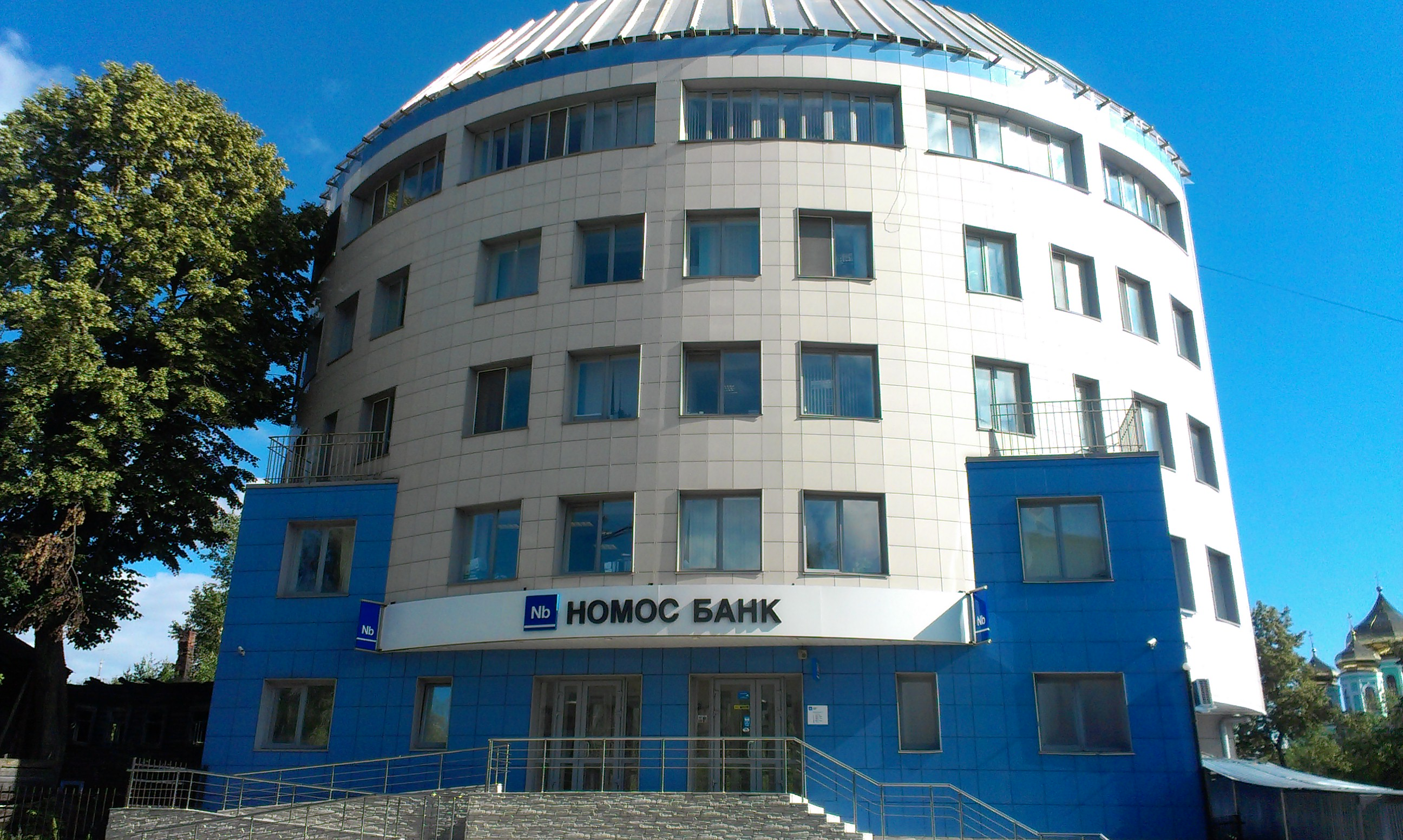 Отделение Номос-Банка (банка ФК Открытие) в перми